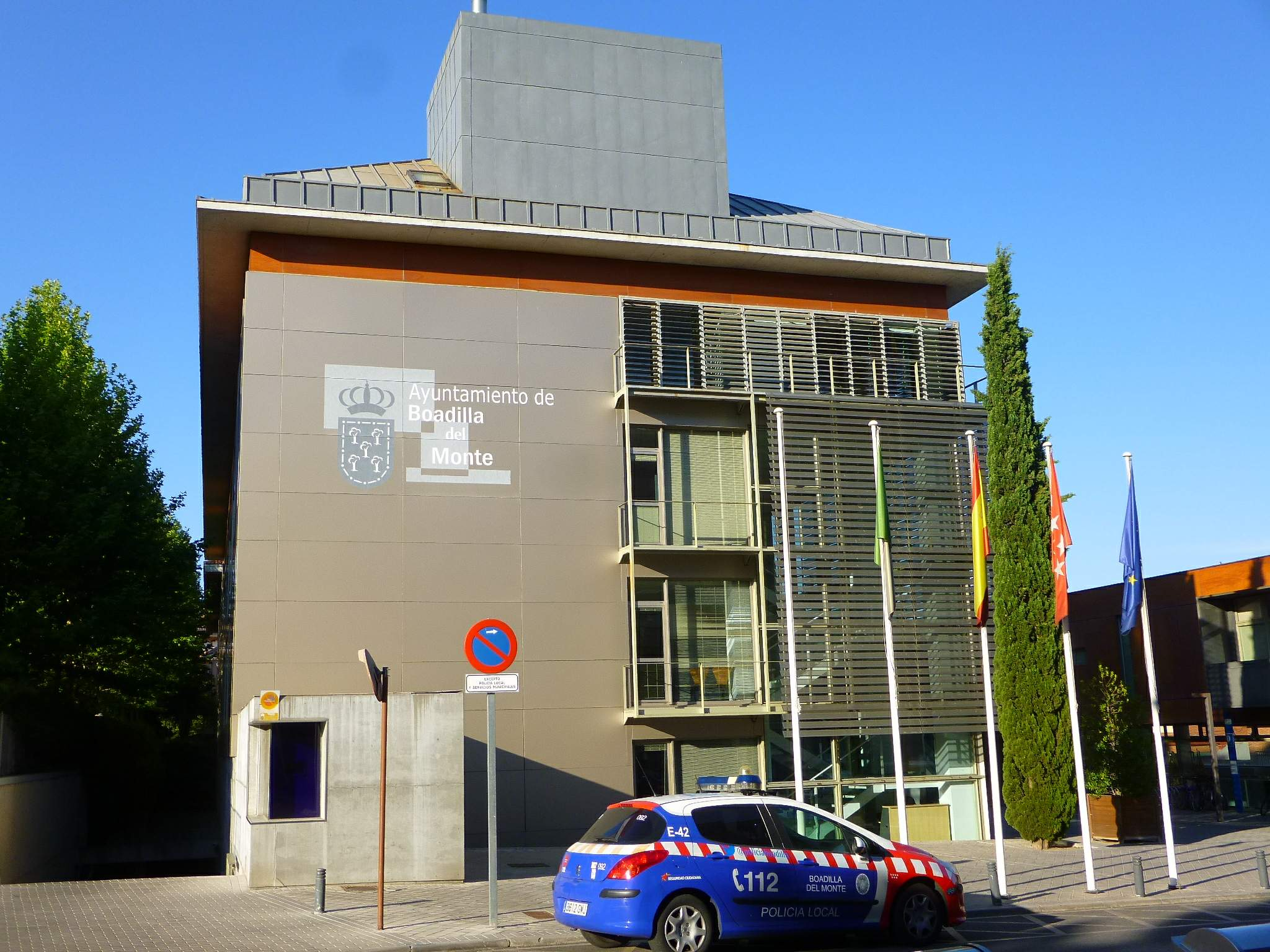 Ayuntamiento de Boadilla del Monte (Madrid)